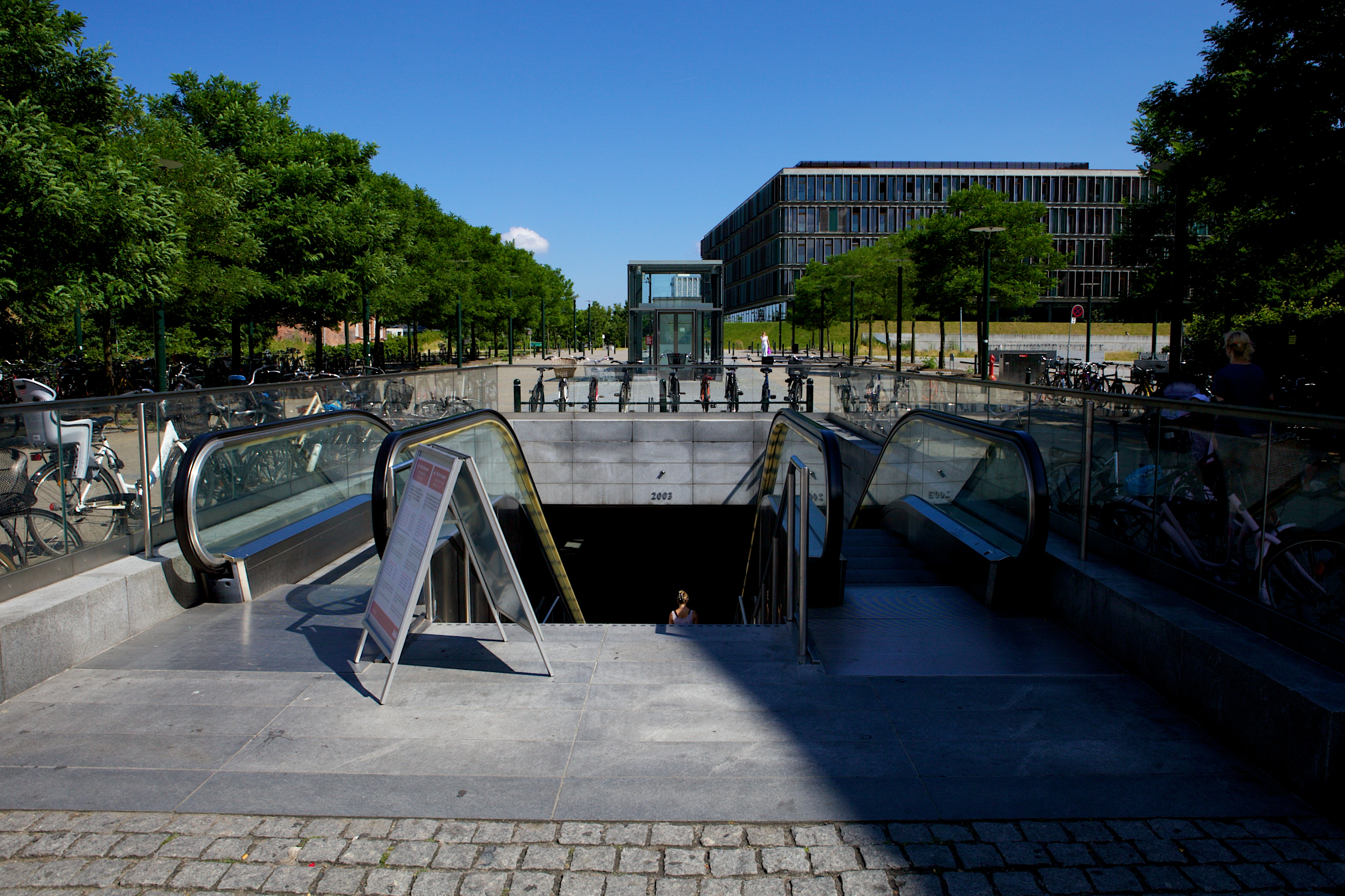 Fasanvej Metrostation, set udefra, kiggende over mod CBS i øst.